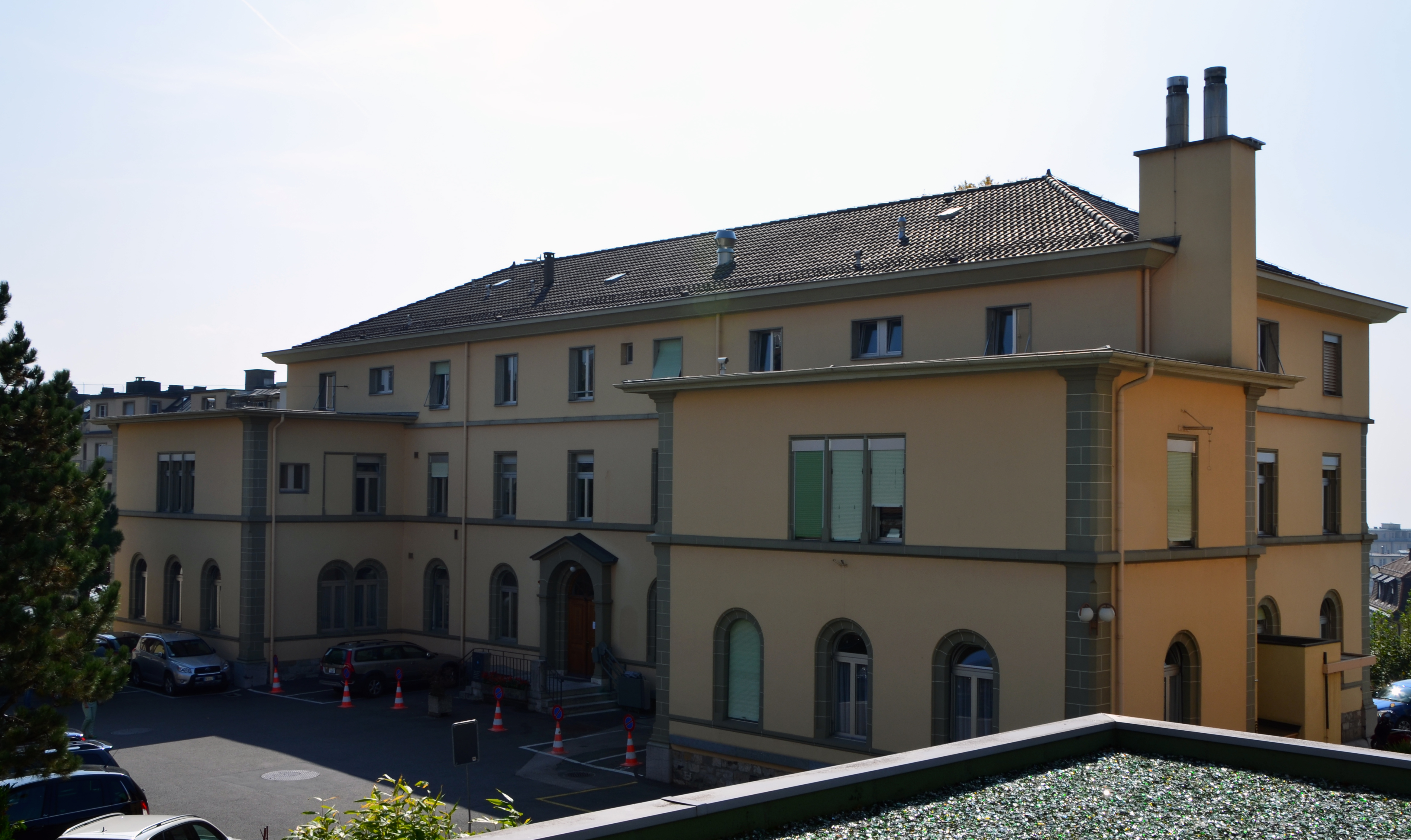 L'ancien bâtiment de l'Hôpital ophtalmique Jules-Gonin de Lausanne (Suisse), datant de 1871